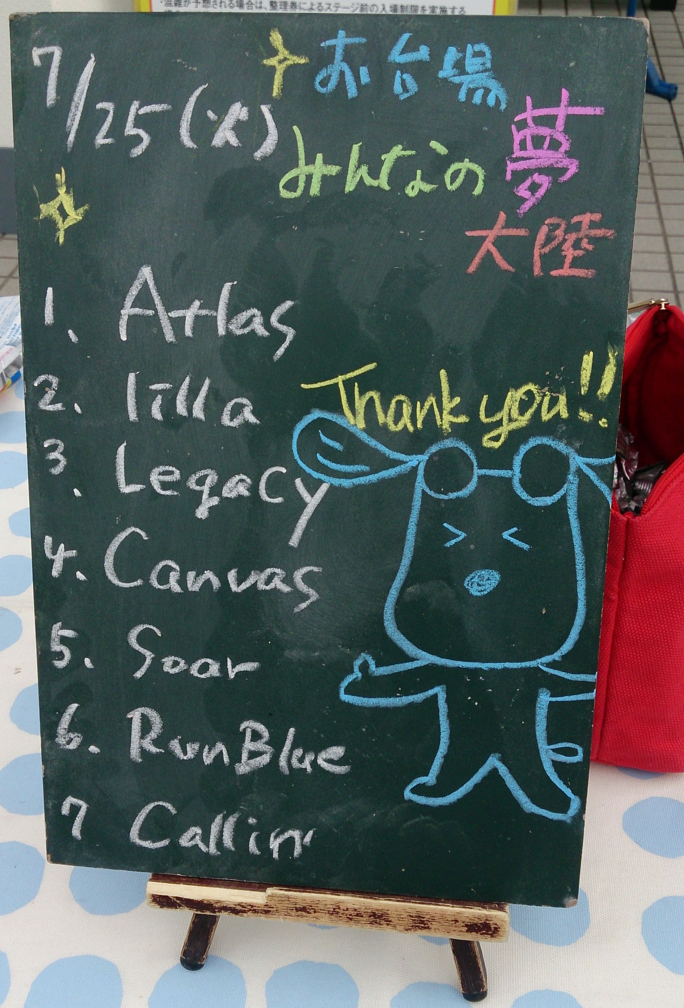 amiinAセトリボード(20170725(1))